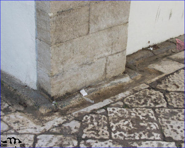 Interno Particolare della canalina di convogliamento delle acque piovane posta lungo il perimetro dell'androne. Palazzo Carmelo a Cerignola (FG).